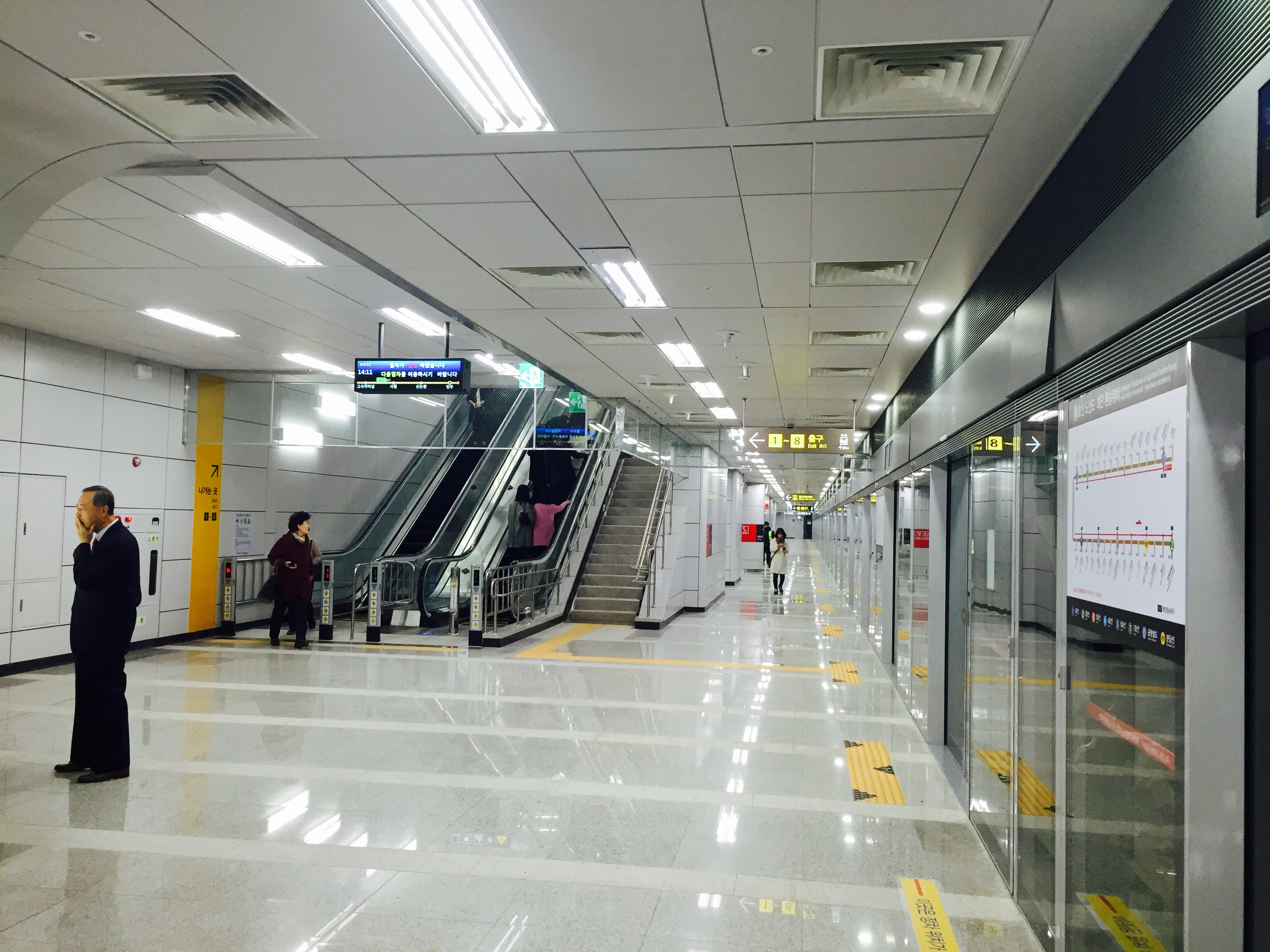 언주역 승강장